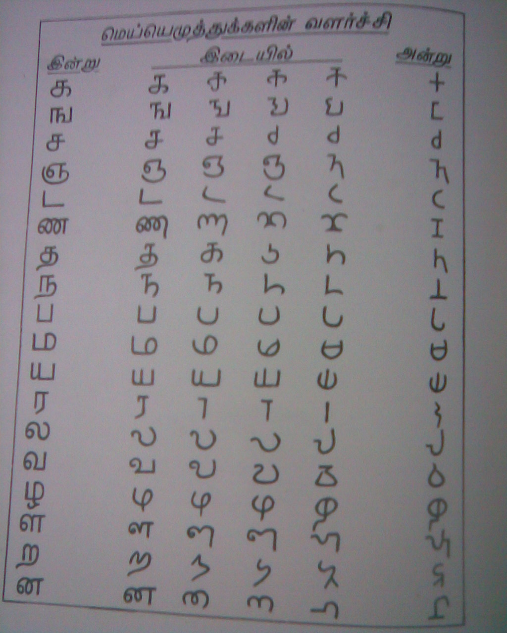 Tamil Layouts Evolution